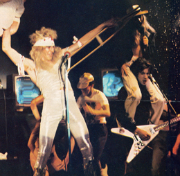 Čiernobiely video systém pre tour The Tubes 1975